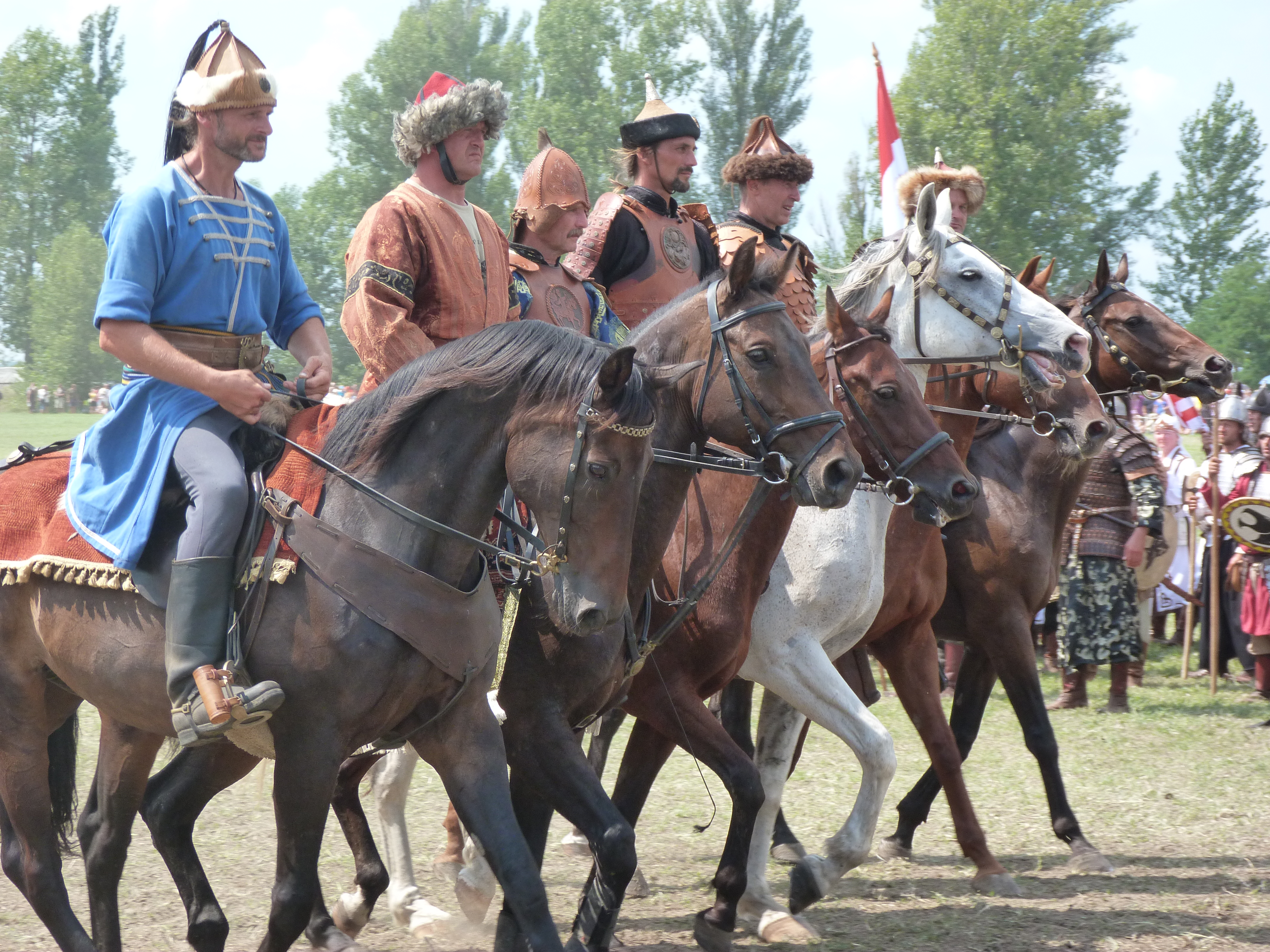 A felvétel 2014. augusztus 9-én, szombaton készült Bugacon. Kurultáj, magyar törzsi gyűlés. ©© Derzsi Elekes Andor, Budapest 2014, You are authorised to use these photos and vids under Creative Commons – even for commercial, for profit purposes. Photos must be attributed to Derzsi Elekes Andor. All of the photos and vids in the Metapolisz DVD line are under Creative Commons and can be used even for commercial – for profit – purposes. Recommended Citation Derzsi Elekes Andor: Metapolisz DVD line